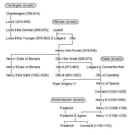 La dynastie des Ottoniens Allemagne